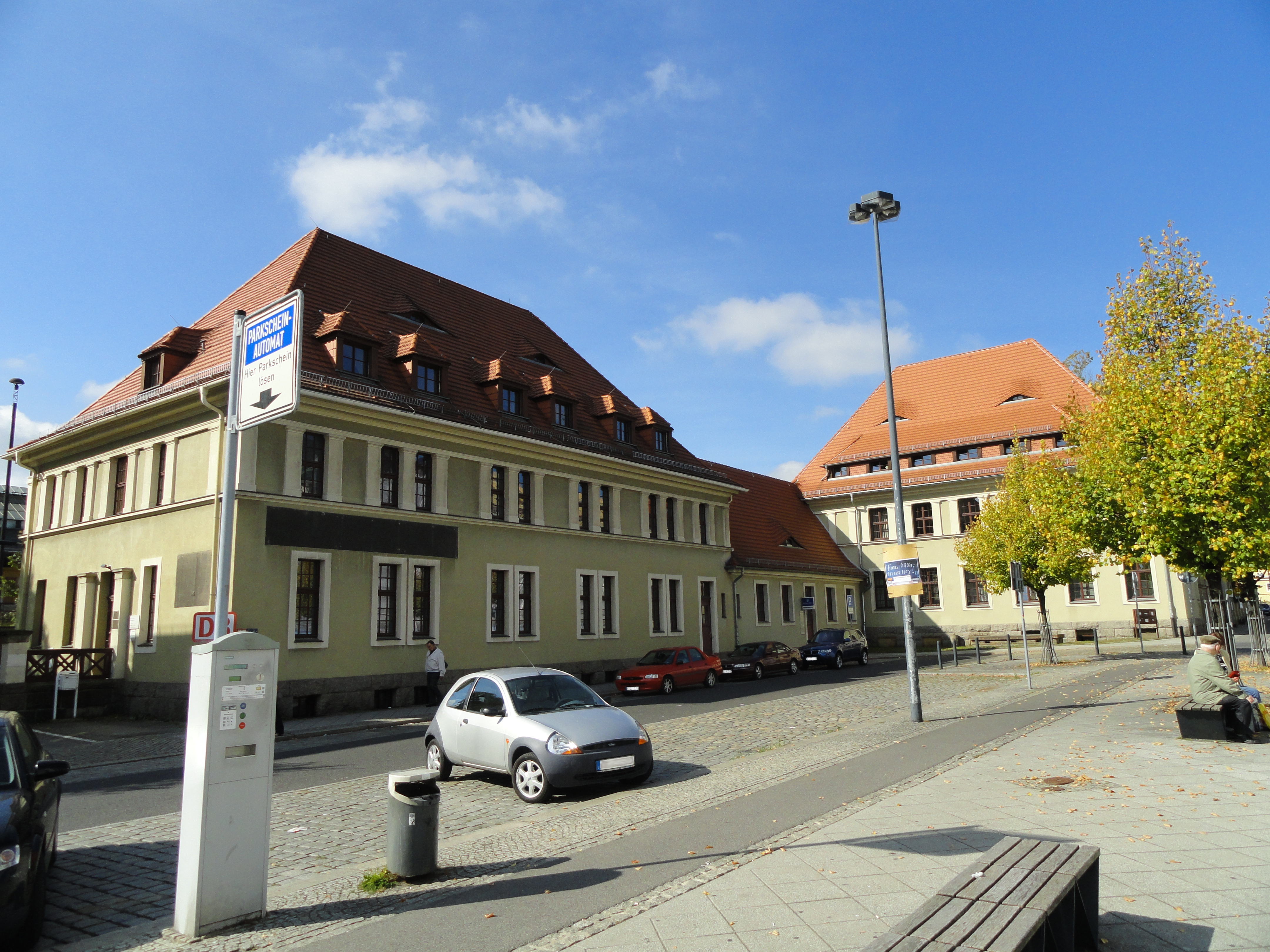 Verwaltungsbau des Bahnhofes Görlitz